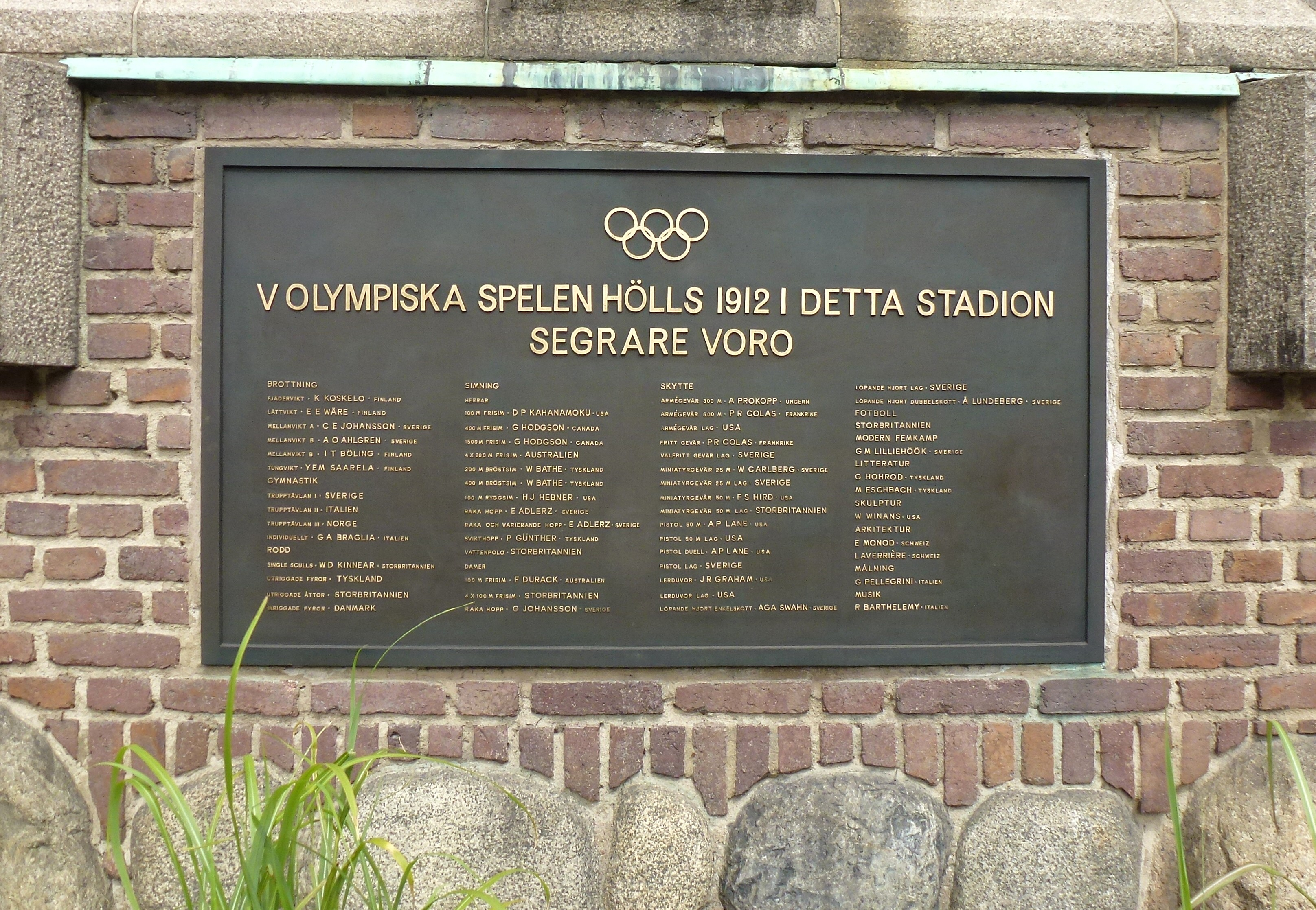 Stockholms stadion minnestaval